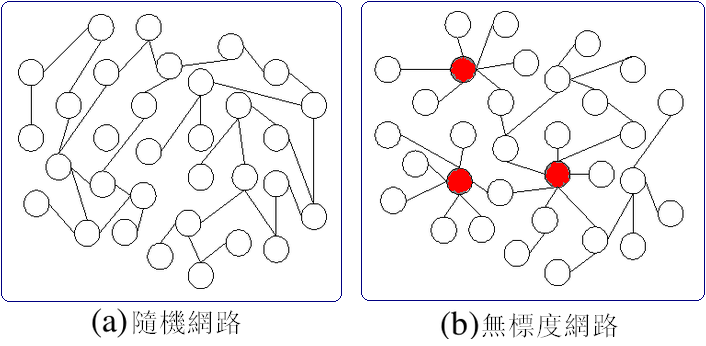 800px-Scale-free_network_zh繁体版